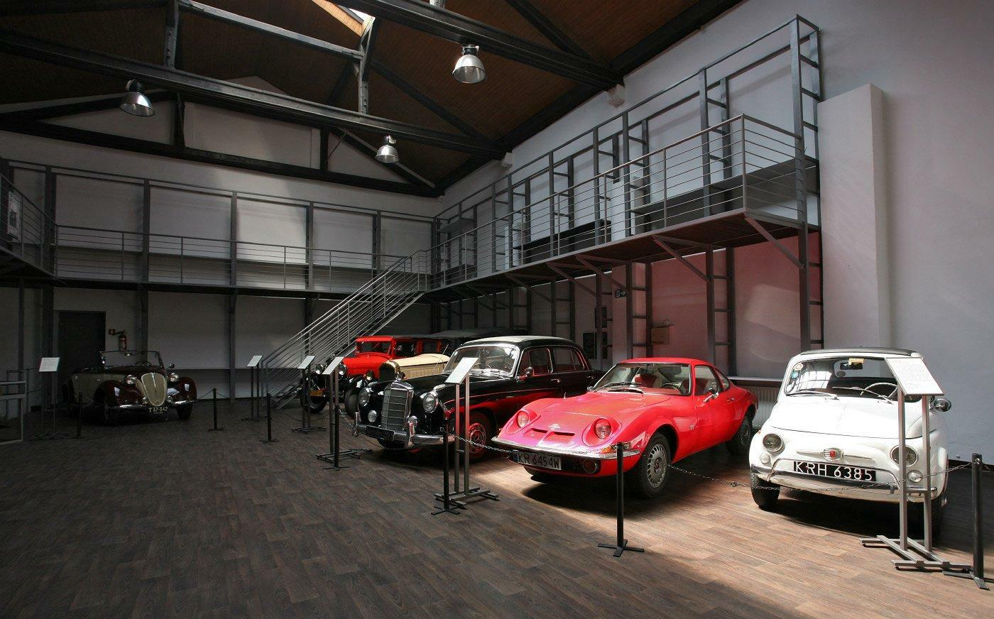 Jedna z sal, w której prezentowane są auta zagraniczne.